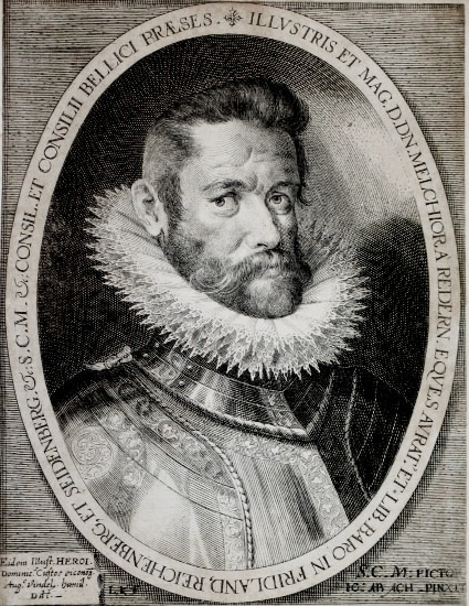 Melchior von Redern, deutscher Feldmarschall